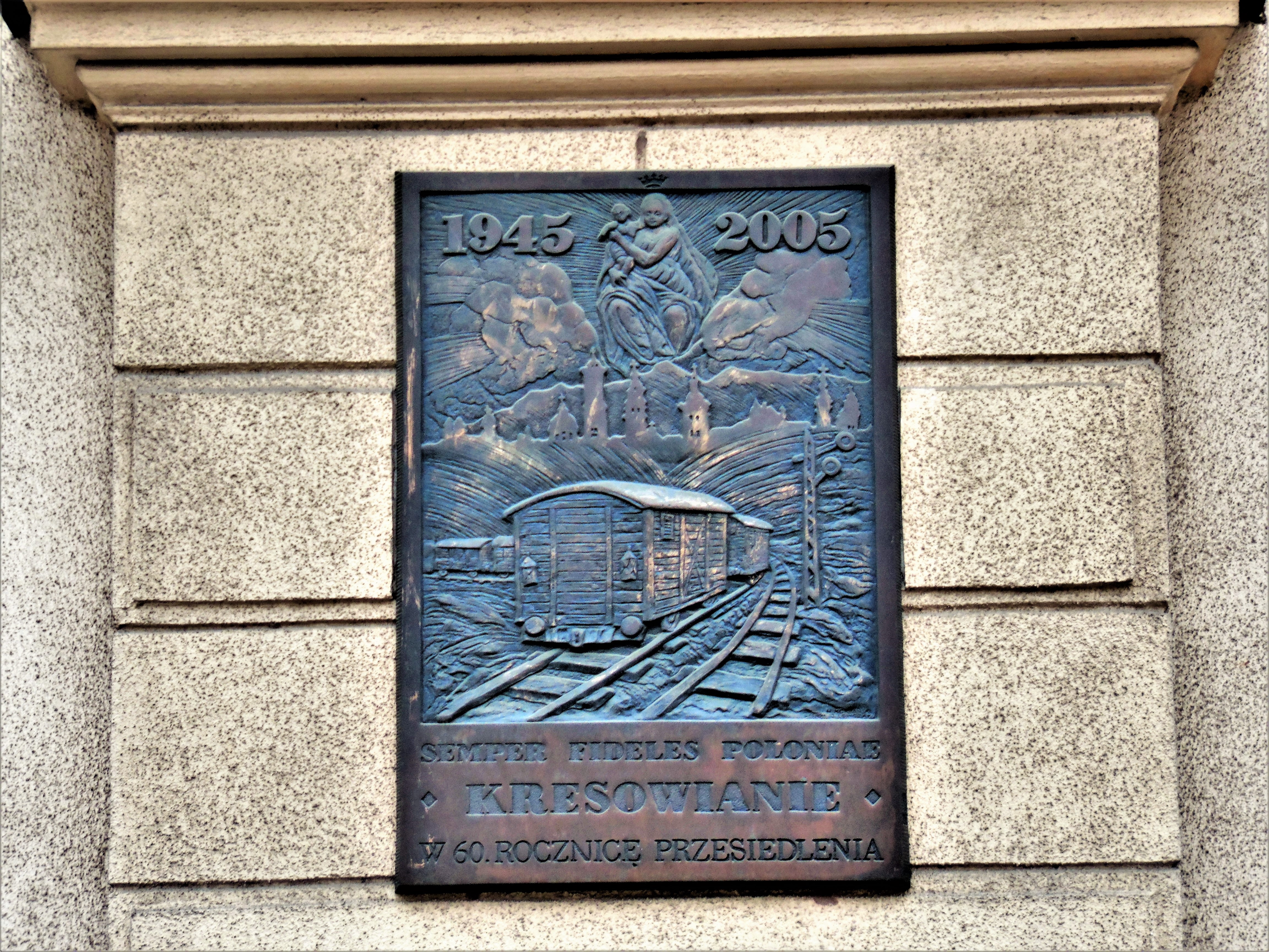 Tablica upamiętniająca przesiedlenia Kresowian.